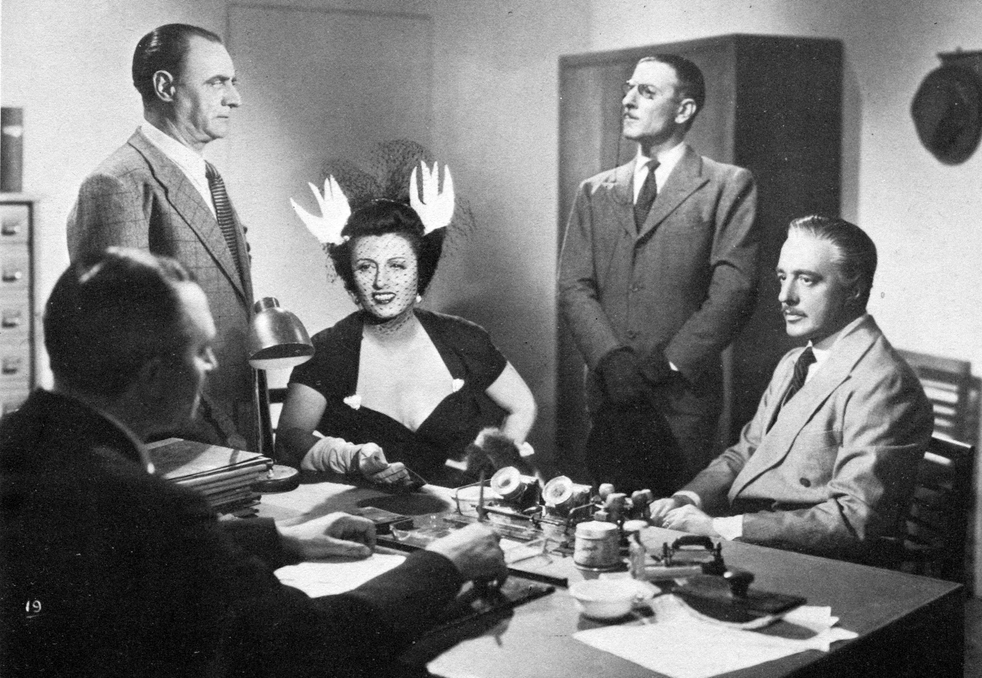 Abbasso la ricchezza! - regia di Gennaro Righelli - produz Ora film + Lux, Roma, 1947 - foto di scena con Enrico Glori, Viriglio Riento, Anna Magnani, Giuseppe Porelli e Vittorio de Sica